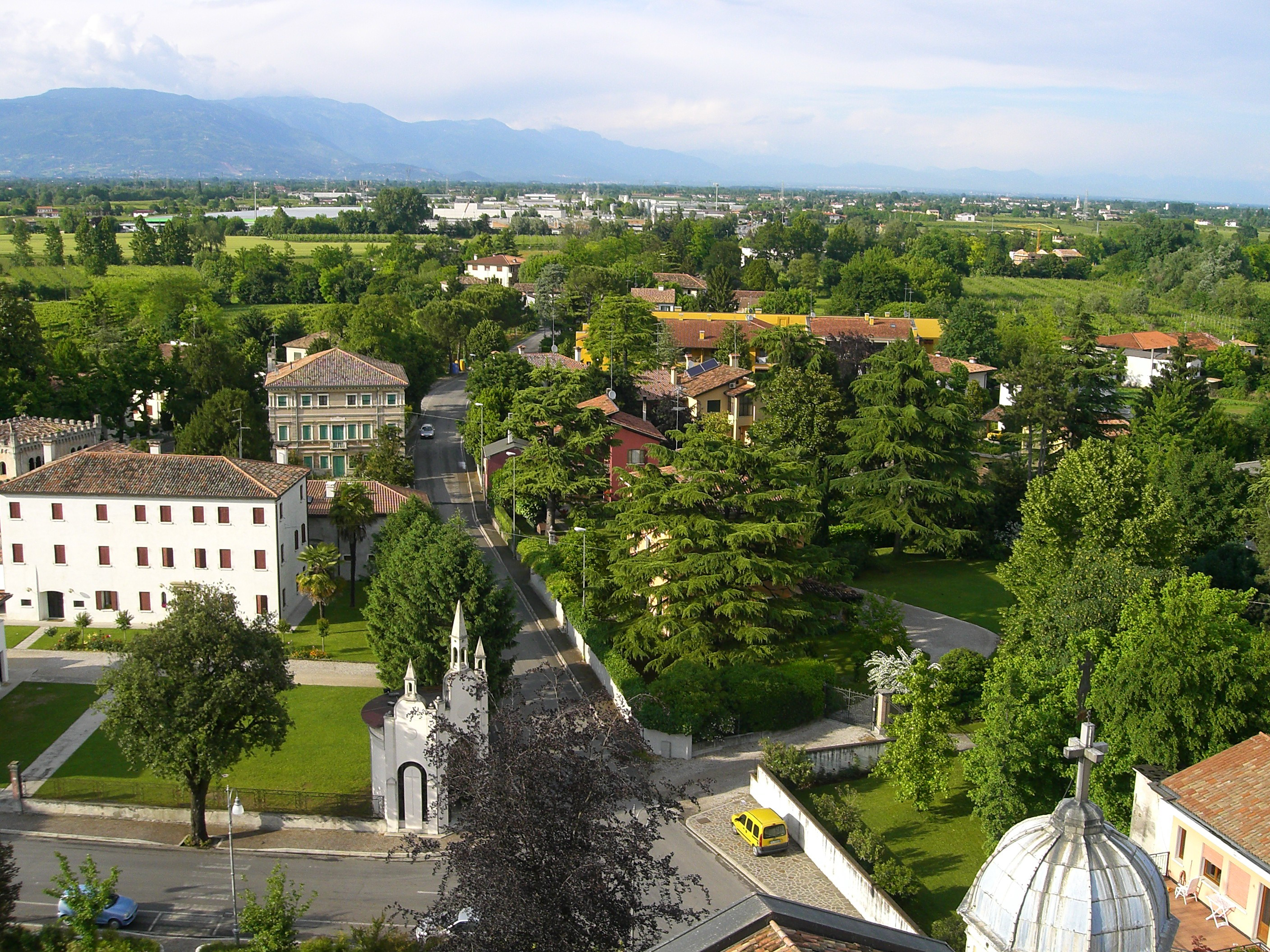 Vista su via Pierantonio Mutti